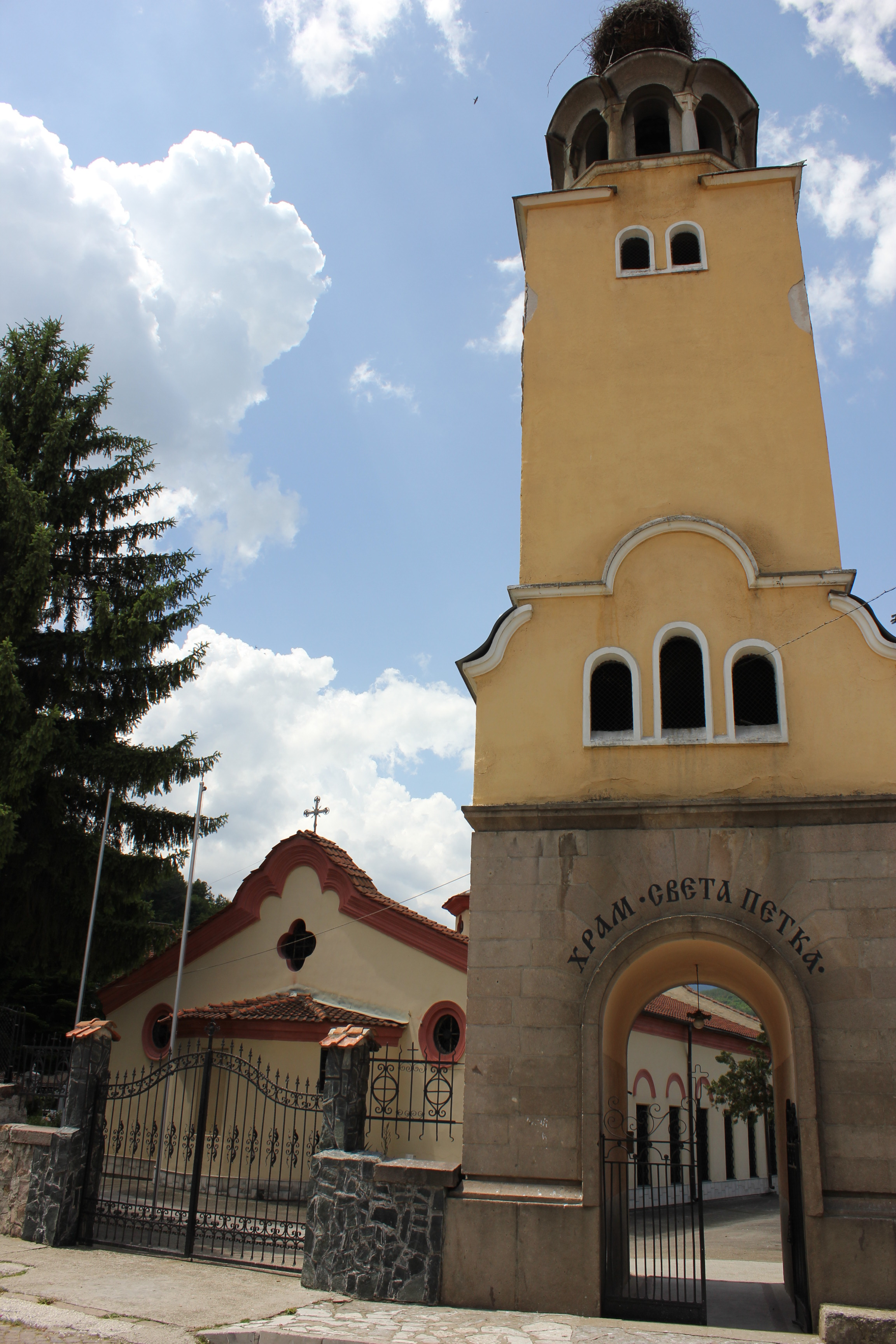 Черква „Св. Петка в град Пещера, България.